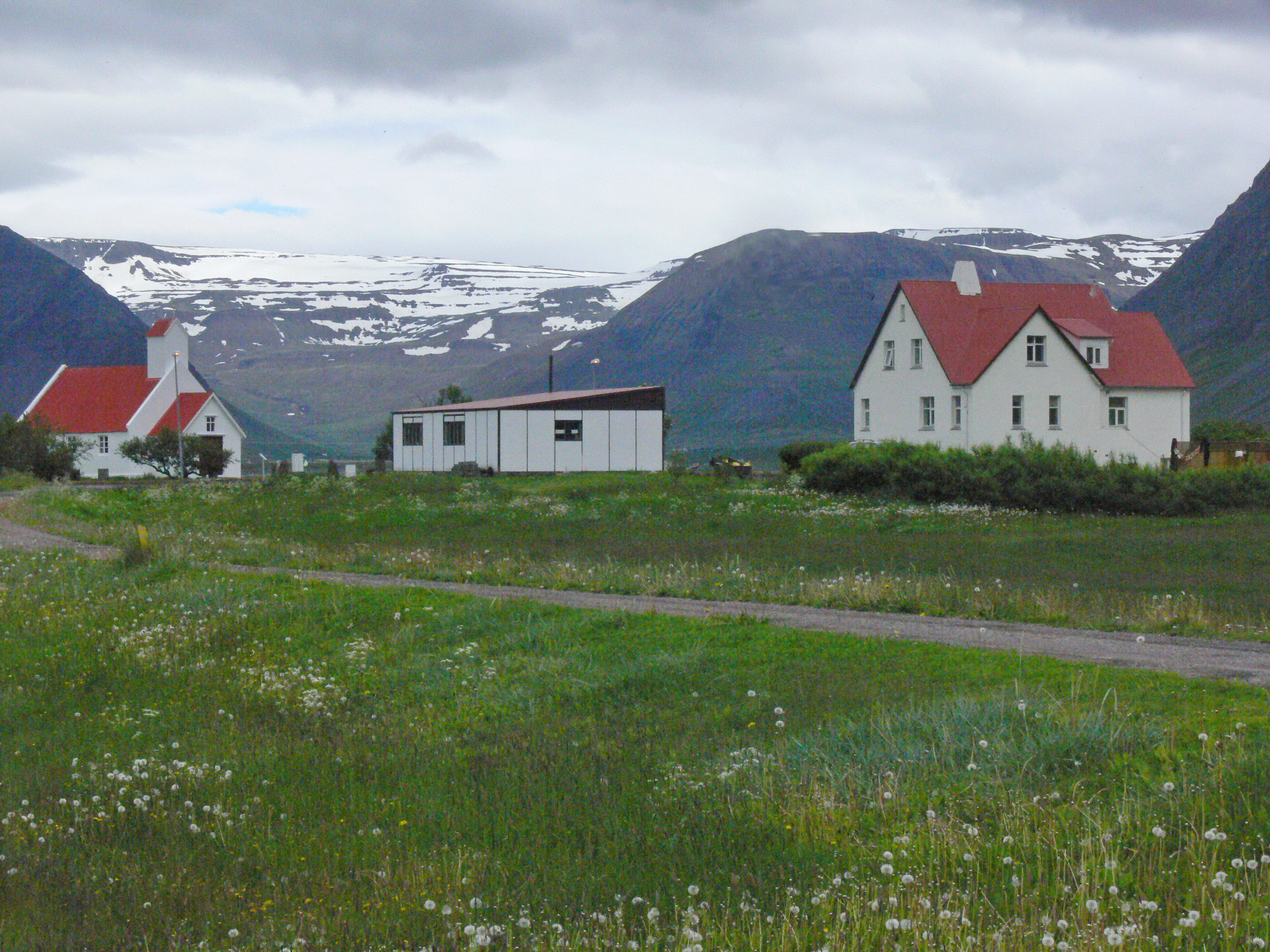 Kirche Holt im Önundarfjörður mit Pfarrhof.